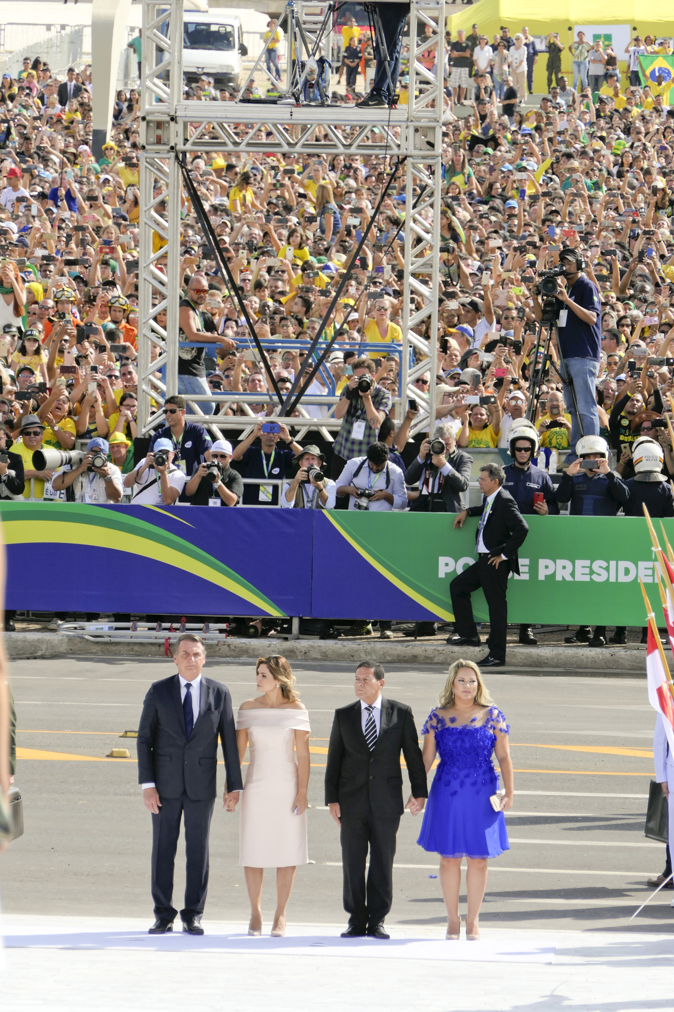 Solenidade de posse do presidente da República e do vice-presidente eleitos. Participam: presidente da República, Jair Bolsonaro; primeira-dama, Michelle Bolsonaro; vice-presidente da República, general Hamilton Mourão; esposa do vice-presidente da República eleito, Paula Mourão. Foto: Roque de Sá/Agência Senado